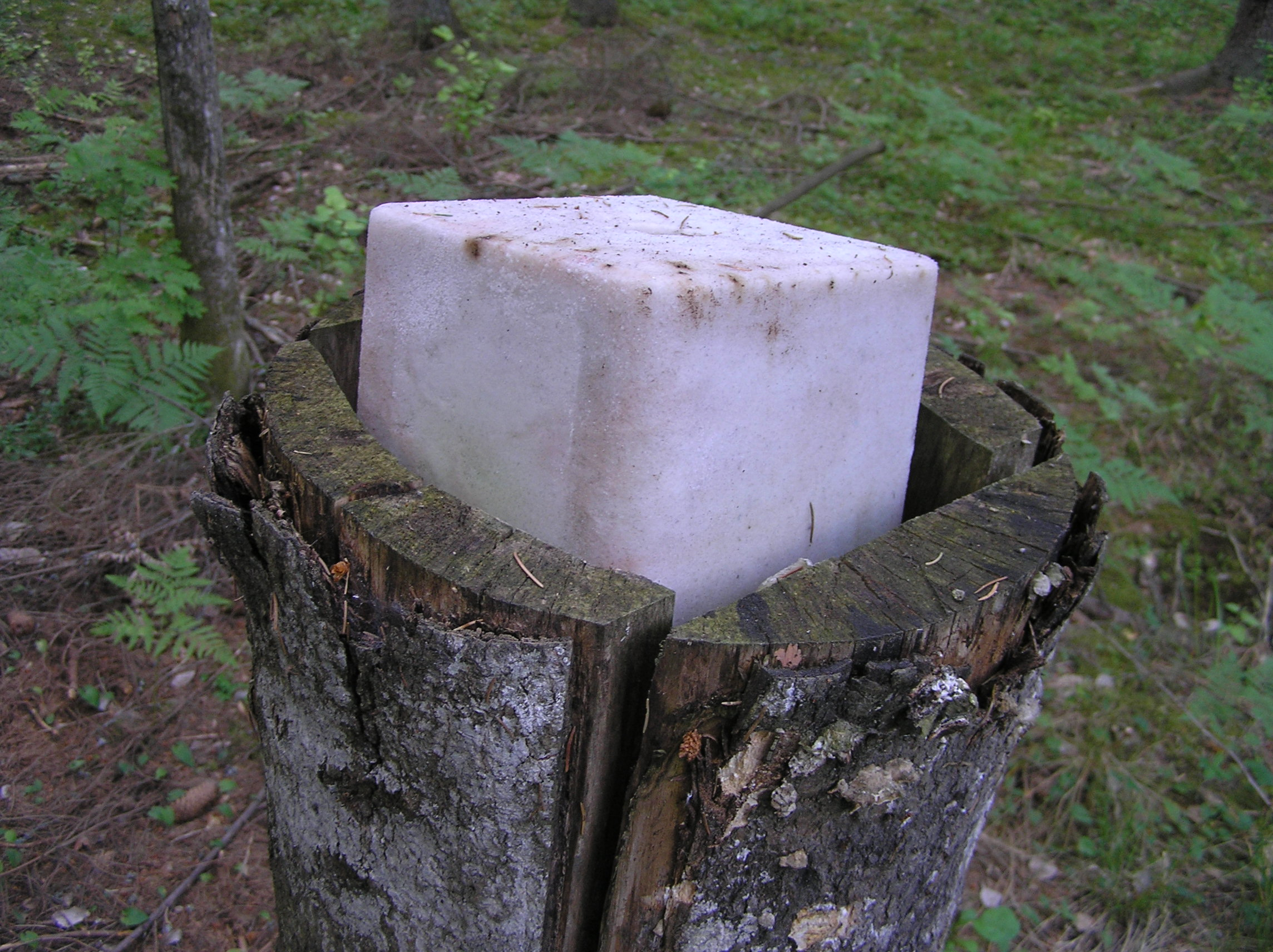 Salt-lick, Lizawka, Białowieża, Polska